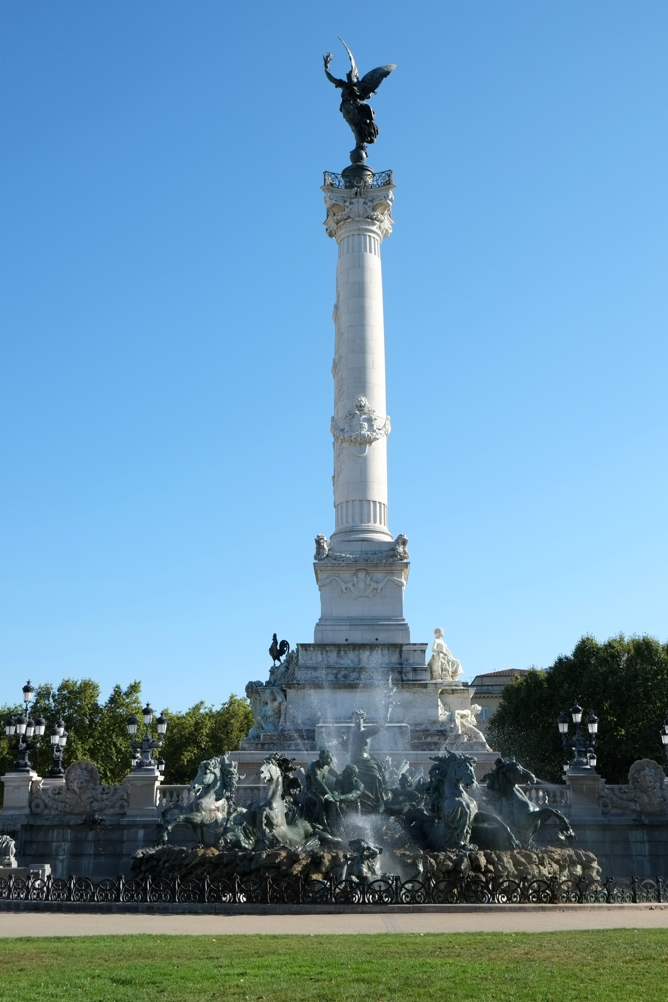 Monument aux Girondins Place des Quinconces Bordeaux Gironde France